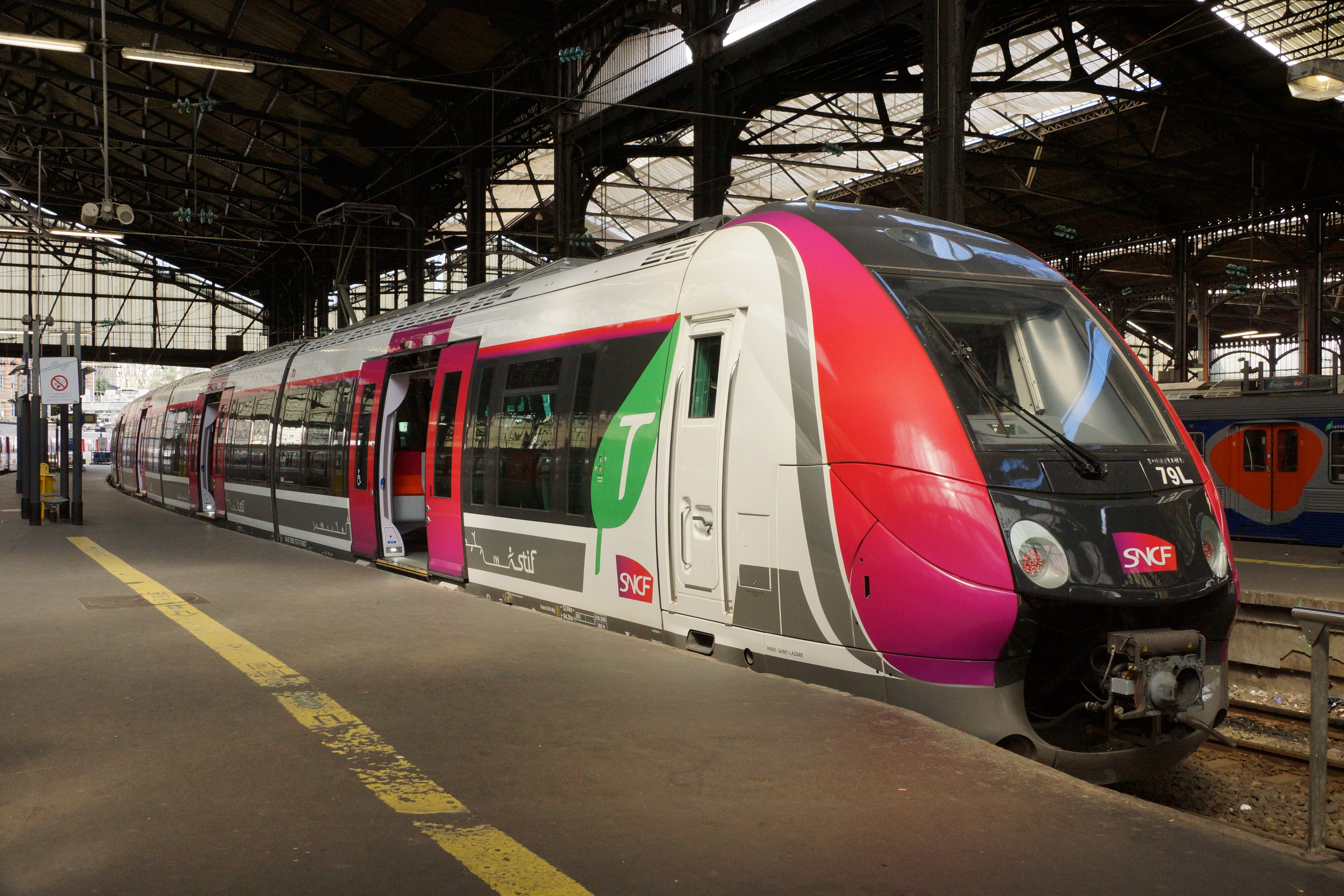 Gare St Lazare, Paris, France.